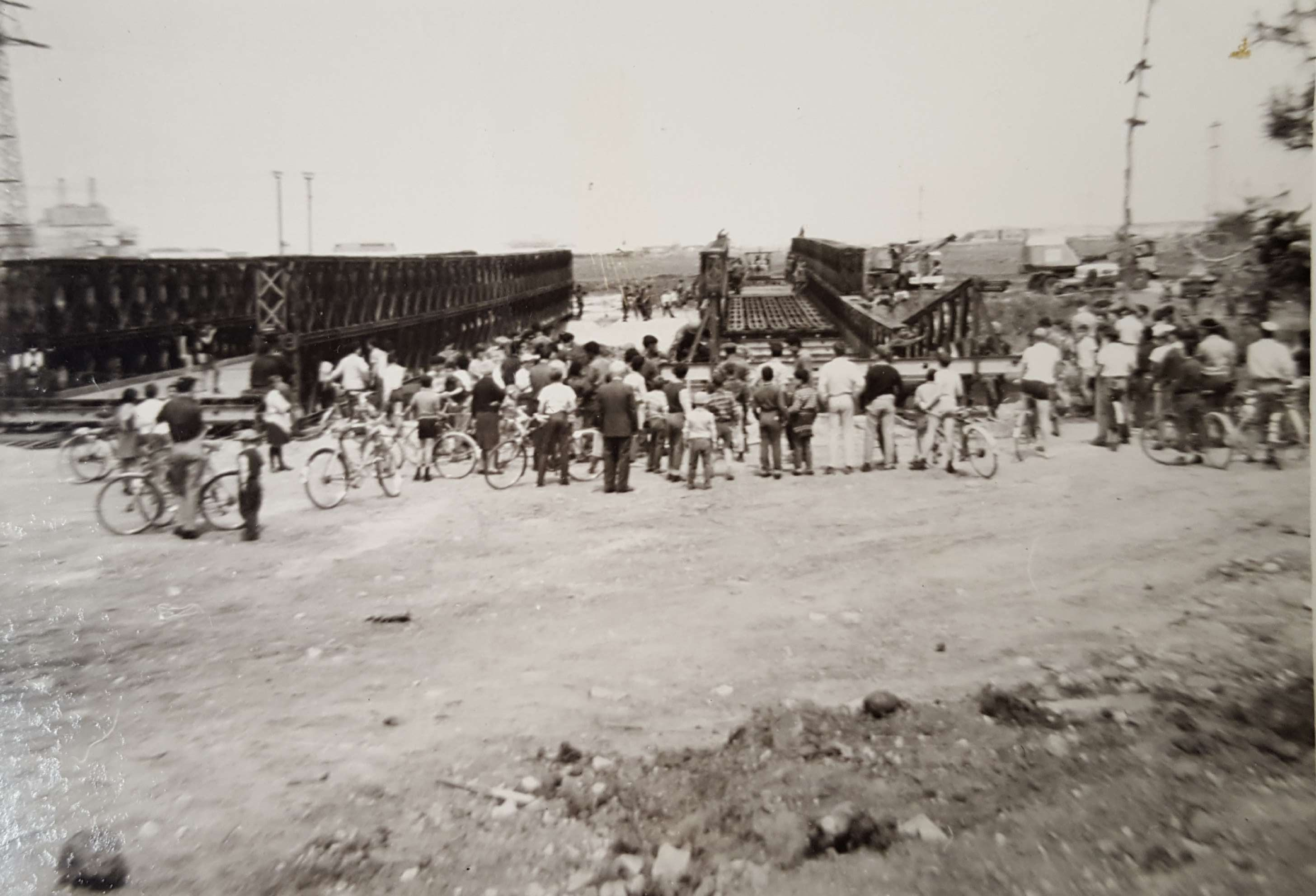 גשרי ביילי שהוקמו על הירקון בהמשך רחוב אבן גבירול לקראת מצעד יום העצמאות 1965. צילם: זאב ערבות